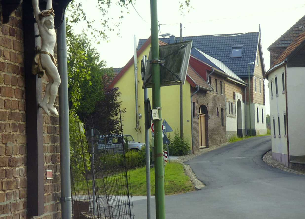 Bildbeschreibung: Hompesch (Titz) Quelle: eigenes Foto Fotograf/Zeichner: bodoklecksel 14:50, 1. Jul 2006 (CEST) Datum: Juni 2006 Sonstiges